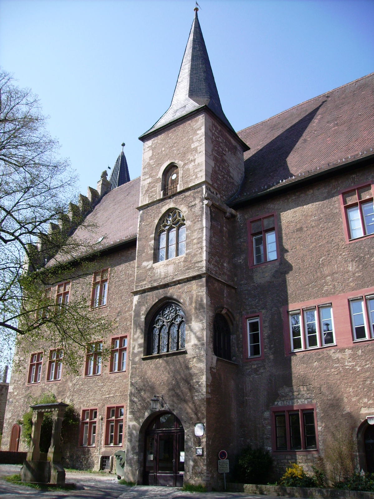 Ochsenfurt. Domkapitelsches Palatium, ehemaliger Sitz des Würzburger Domkapitels (Ende 15. Jahrhundert).